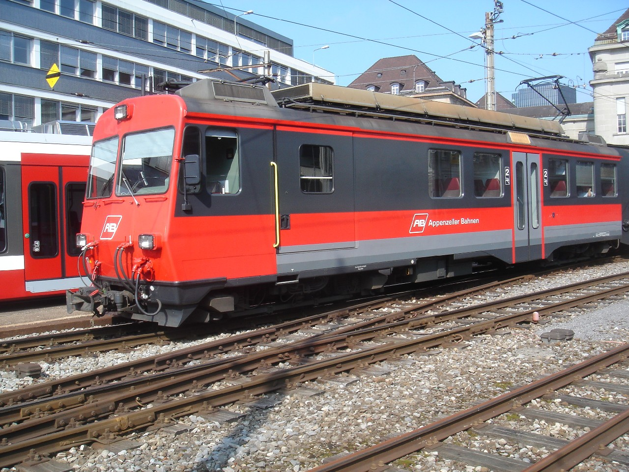 BDeh 4/4 17 der Appenzeller Bahnen im St. Galler Nebenbahnhof